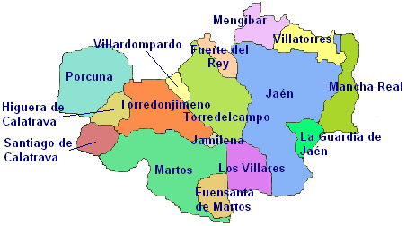 Municipios de la Comarca Metropolitana de Jaén